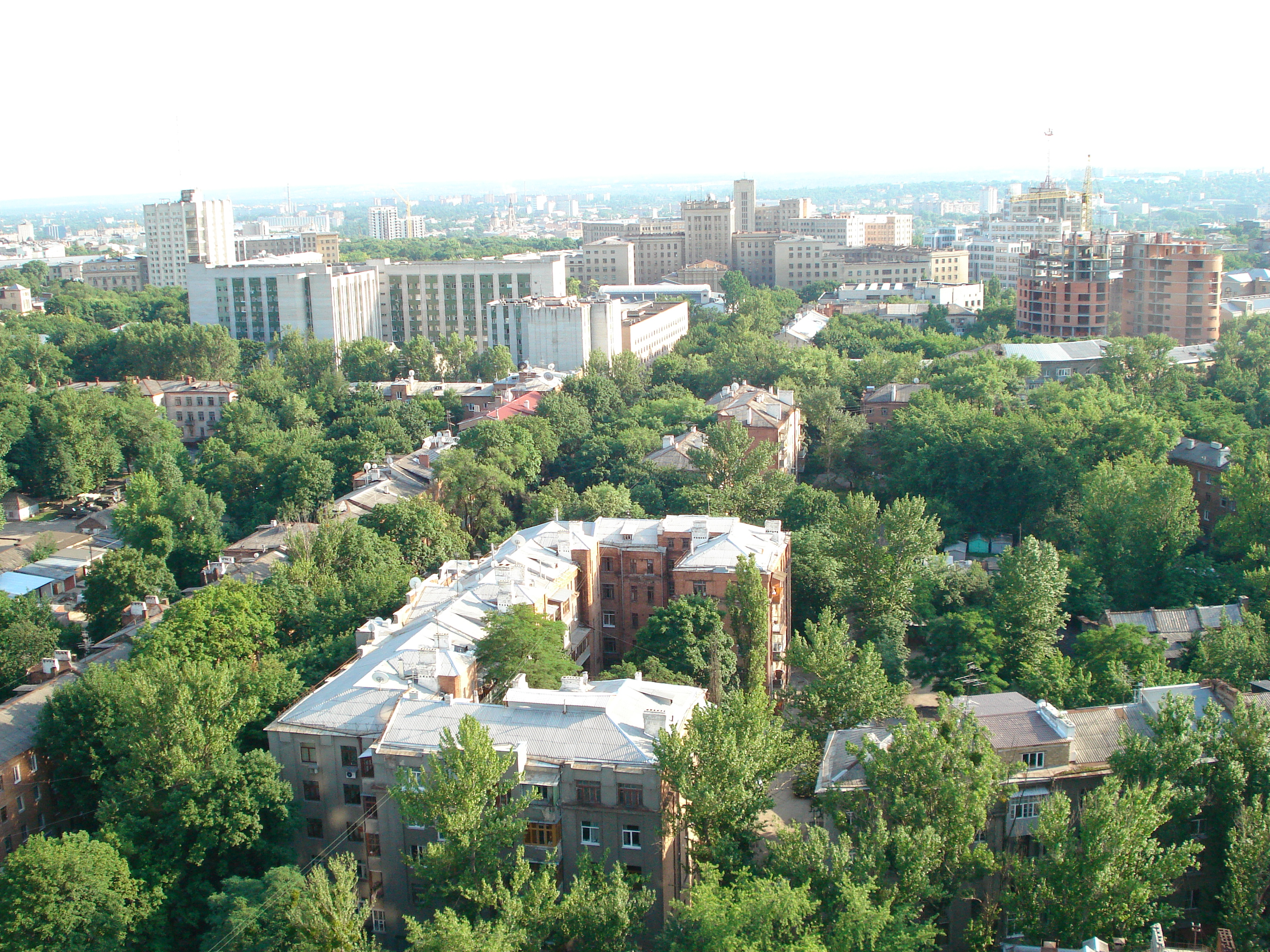 Улица Ярослава Галана, Дзержинский район Харькова (Харьков). Вид с отметки + 70 м от улицы Культуры в сторону ХГУ. Вид на дом «Слово» (прямо внизу), областную больницу (белая слева), гостиницу «Харьков» (первоначально «Интернационал») (высотный белый корпус слева за больницей), Академию имени Говорова (прямо), университет (за академией), Госпром (в самом углу справа) со стороны парка Горького.